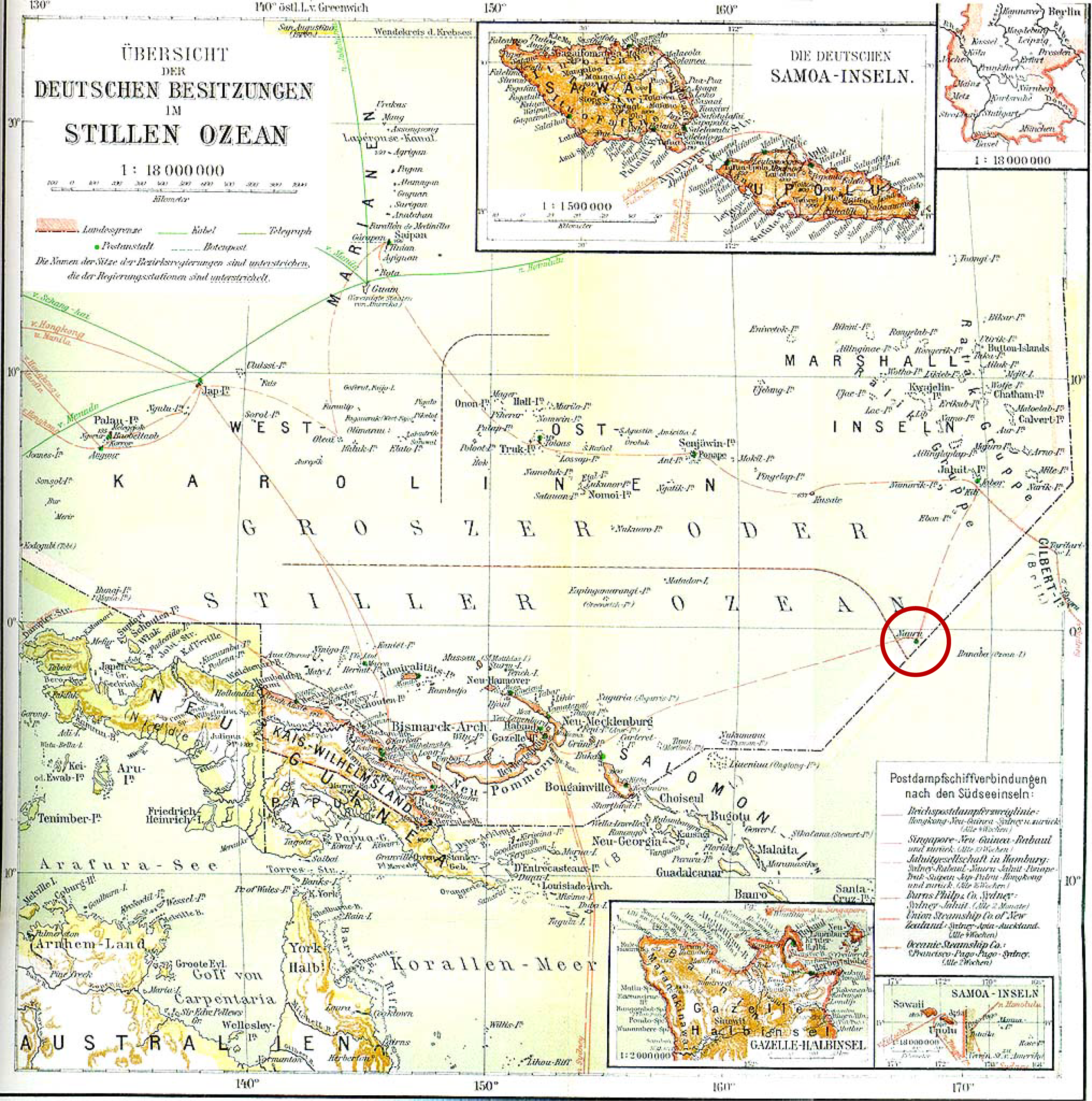 Übersicht der Deutschen Besitzungen im Stillen Ozean.